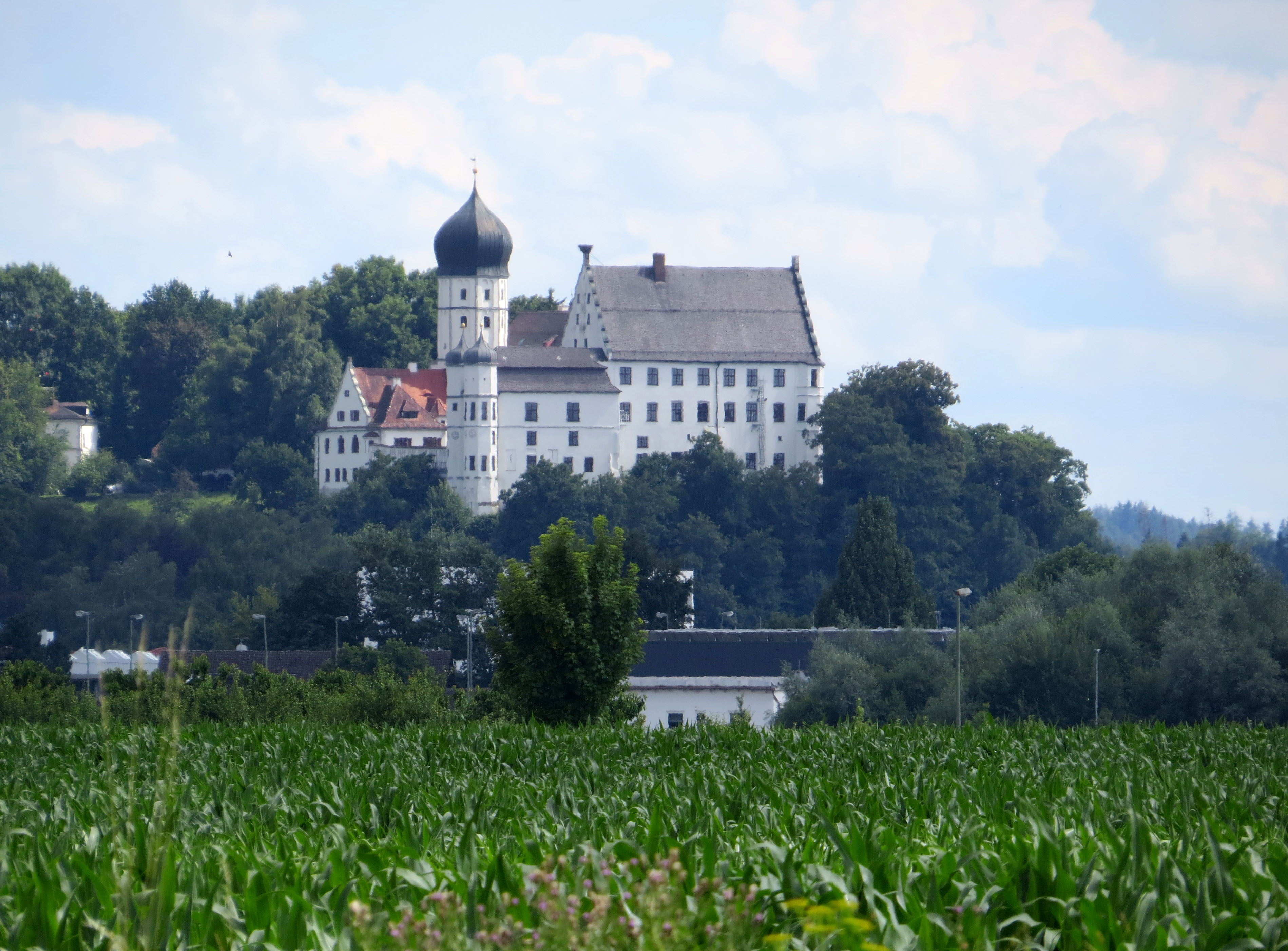 Vöhlinschloss in Illertissen von Norden